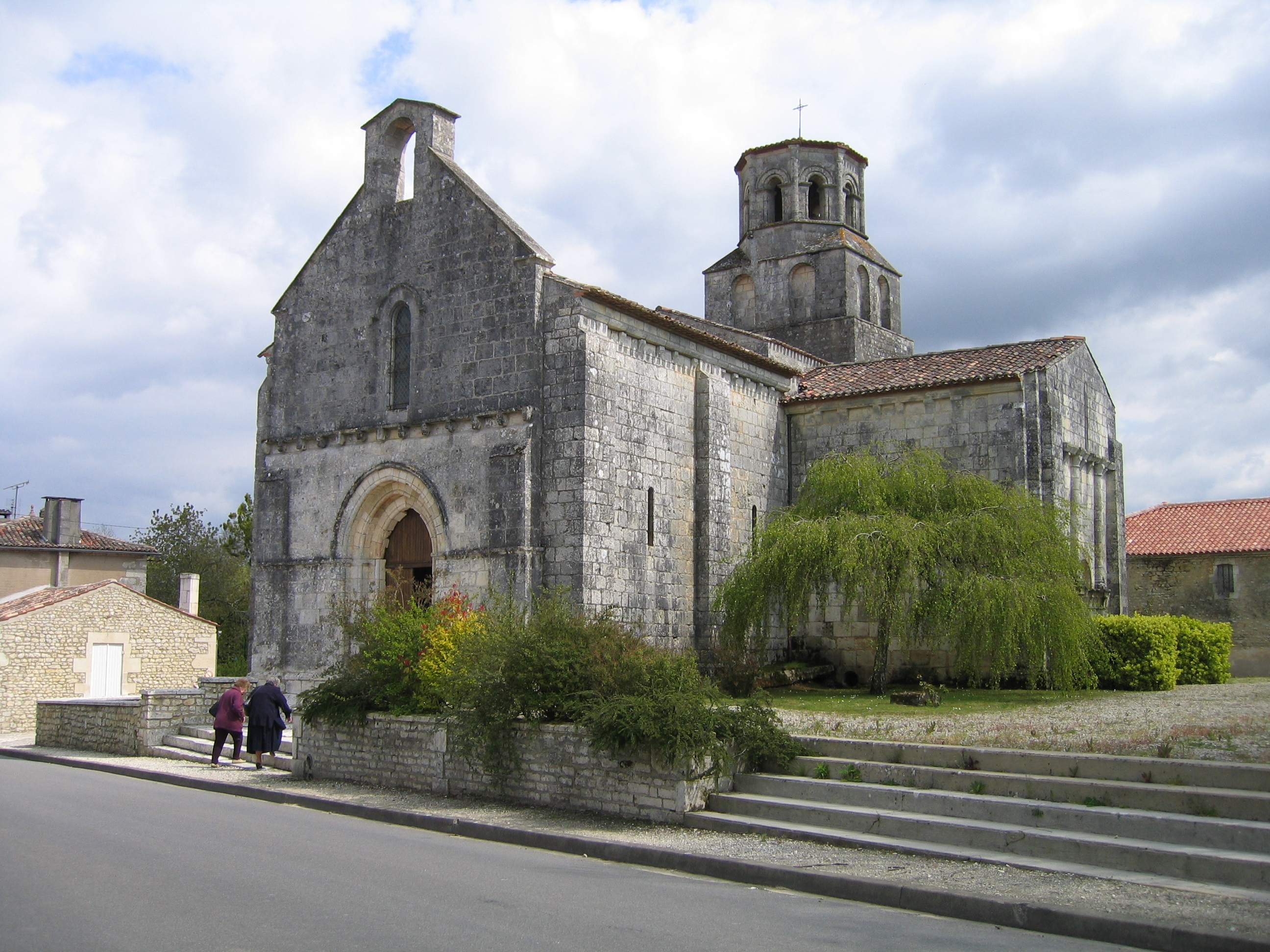 L'église romane de Thaims